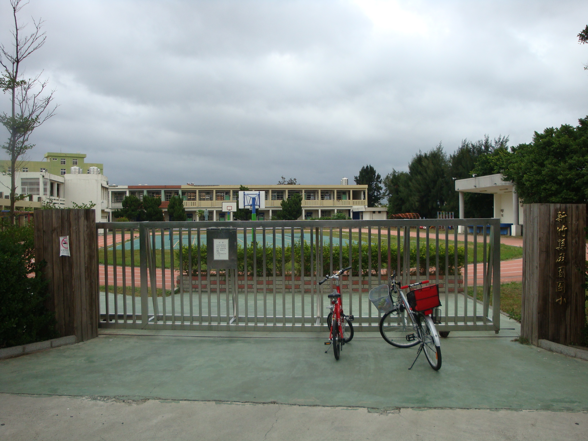 位於南牆的大門